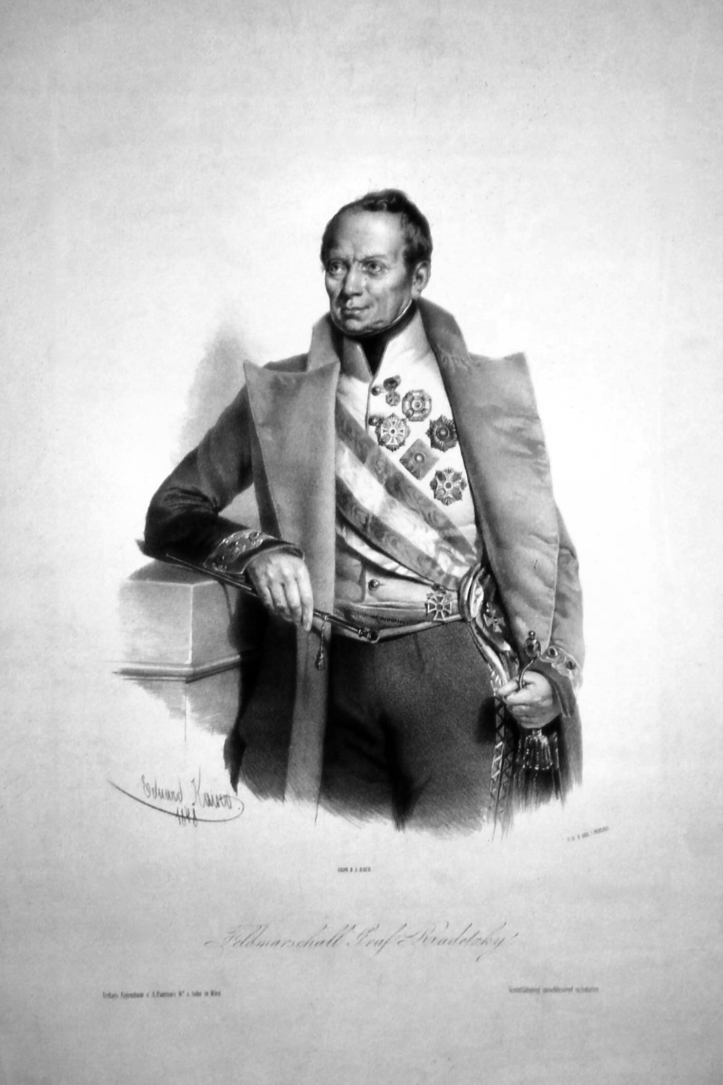 Josef Wenzel Radetzky von Radetz (1766-1858) österreichischer Feldmarschall. Lithographie von Eduard Kaiser, 1848